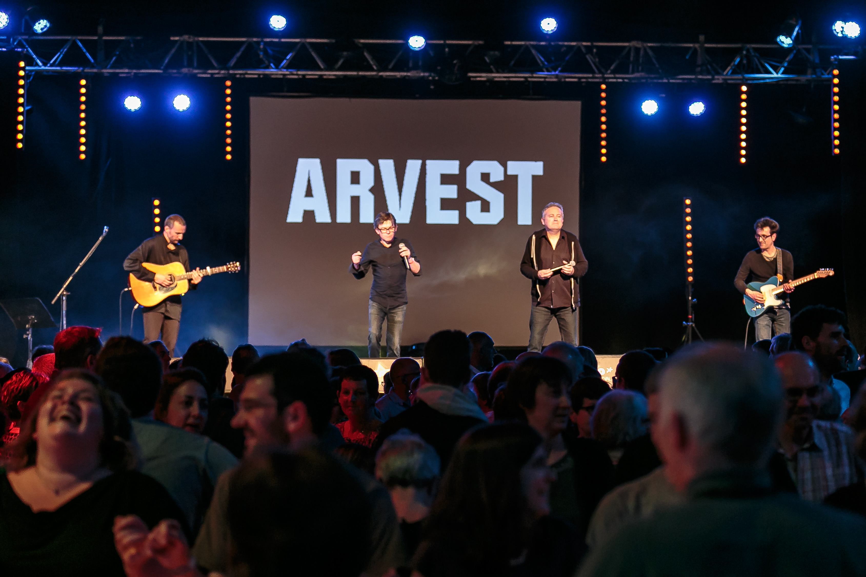 Arvest lors du fest-noz Stered au parc des expositions Lango de Morlaix le 9 avril 2016.